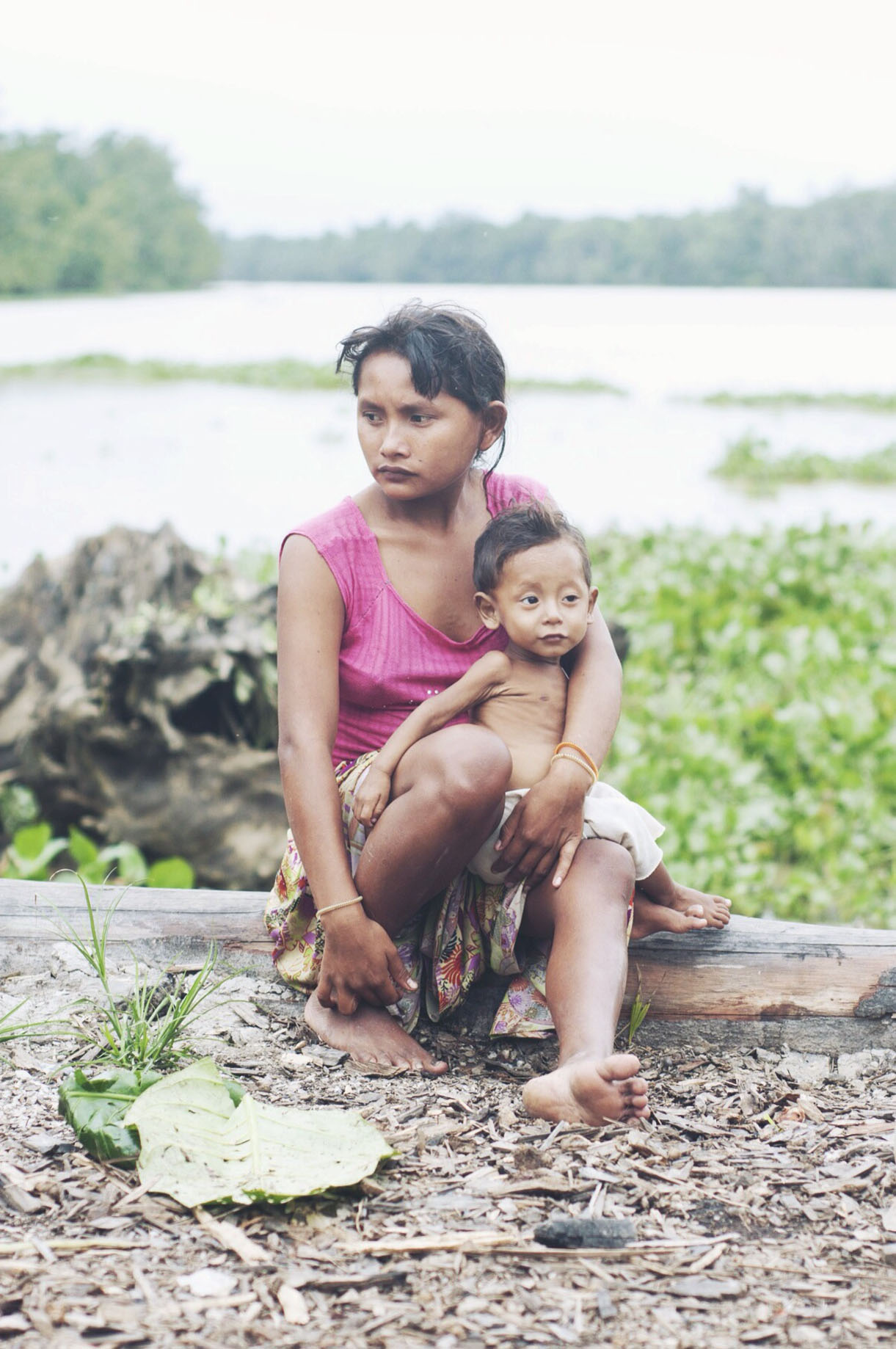 Una mujer y su hijo, pueblo indigena de Warao que habita en el delta del Orinoco